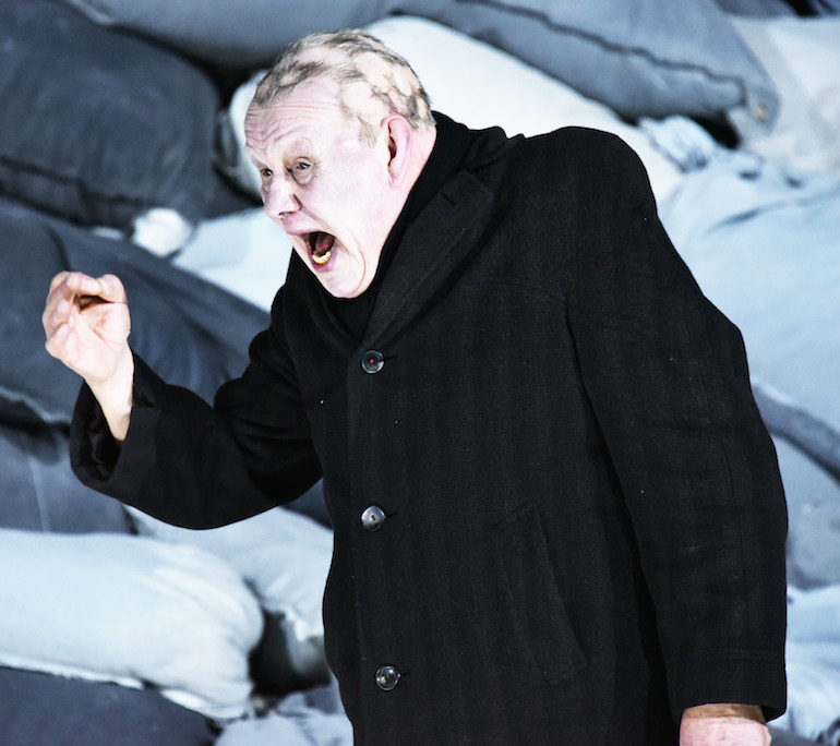 Die Macht der Finsternis Akademietheater Wien, 2015